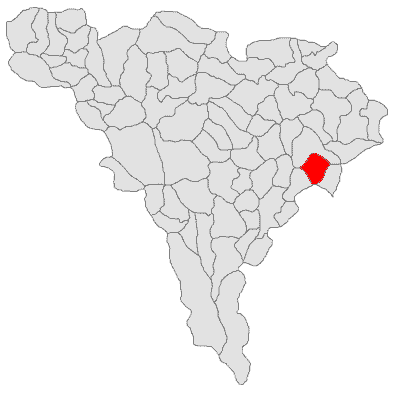 Categorie:Hărţi ale judeţului Alba